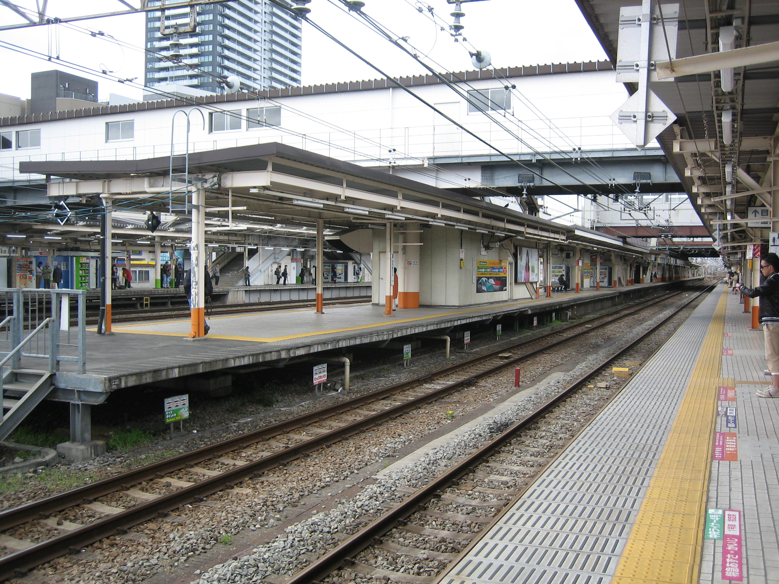 八王子駅のプラットホーム